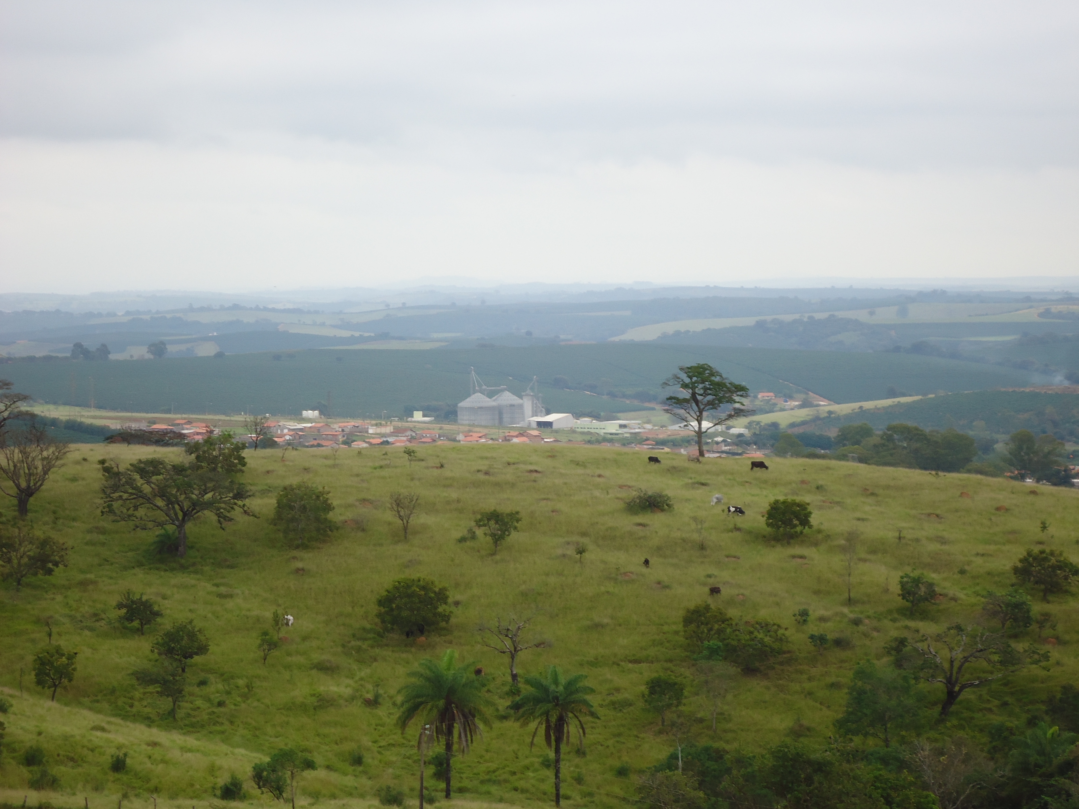 Vista das colinas de Três Pontas próximo ao morro conhecido como Paraíso.